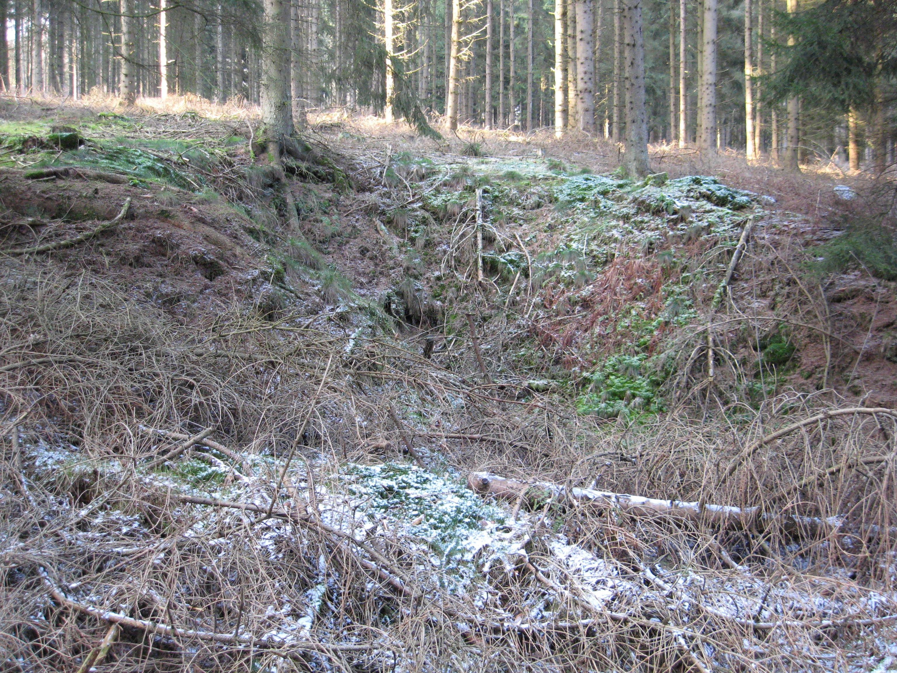 Bergbaureste im Gebiet der Grube Rennseifen / near Rennseifen mine